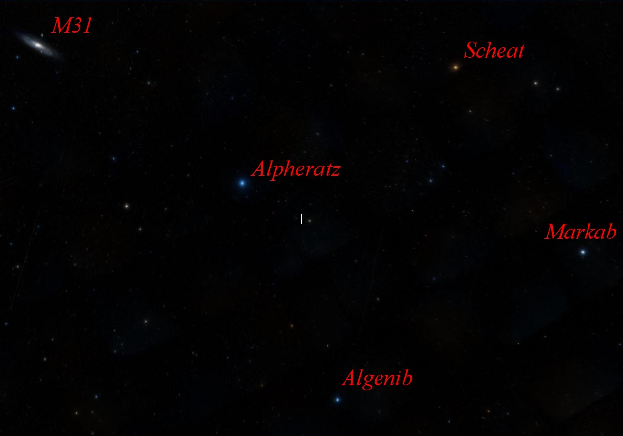 Pegasův čtverec: Alpheratz (α And), Scheat (β Peg), Markab (α Peg) a Algenib (γ Per).